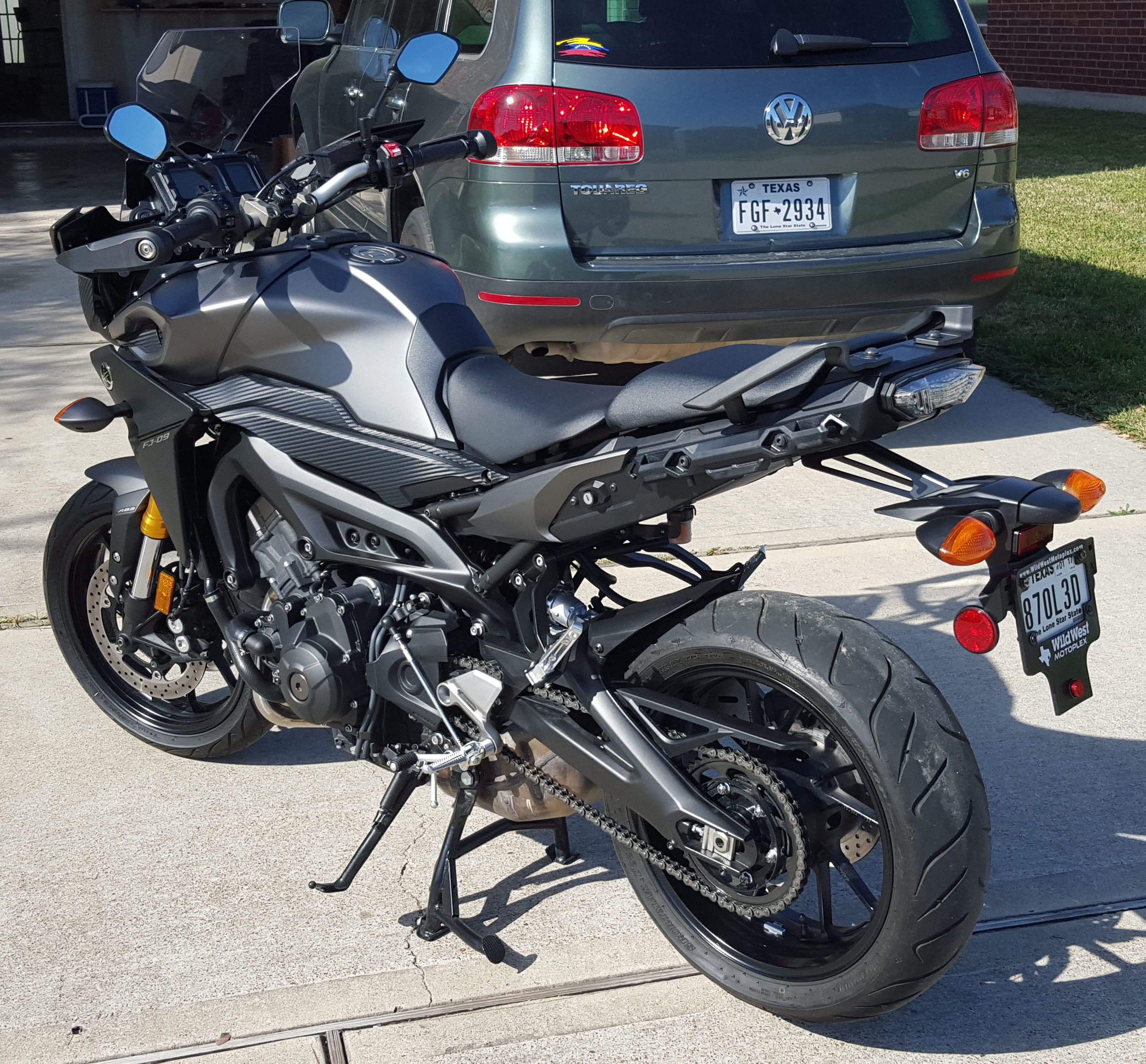 Yamaha MT-09 Tracer (FJ-09)